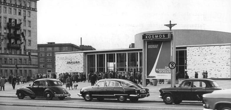 Berlin, Karl-Marx-Allee, Kino "Kosmos" Zentralbild Eckleben Ge. 7.5.1963 Welturaufführung Das Russische Wunder in Berlin. Das Russische Wunder - einer der bedeutensten Dokumentarfilme der Nachkriegszeit - von Annelie und Andrew Thorndike, erlebte am 6.5.1963 im Berliner Filmtheater Kosmos seine Welturaufführung. Annelie und Andrew Thorndike haben über 4 Jahre an dem 'Dokumentarfilm gearbeitet und sind mit drei Aufnahmestäben 800.000 km durch das Sowjetland gereist. Das Ergebnis ihrer Arbeit ist ein ergreifendes Filmwerk. UBz: Blick auf das Filmtheater Kosmos kurz vor Beginn der Welturaufführung.